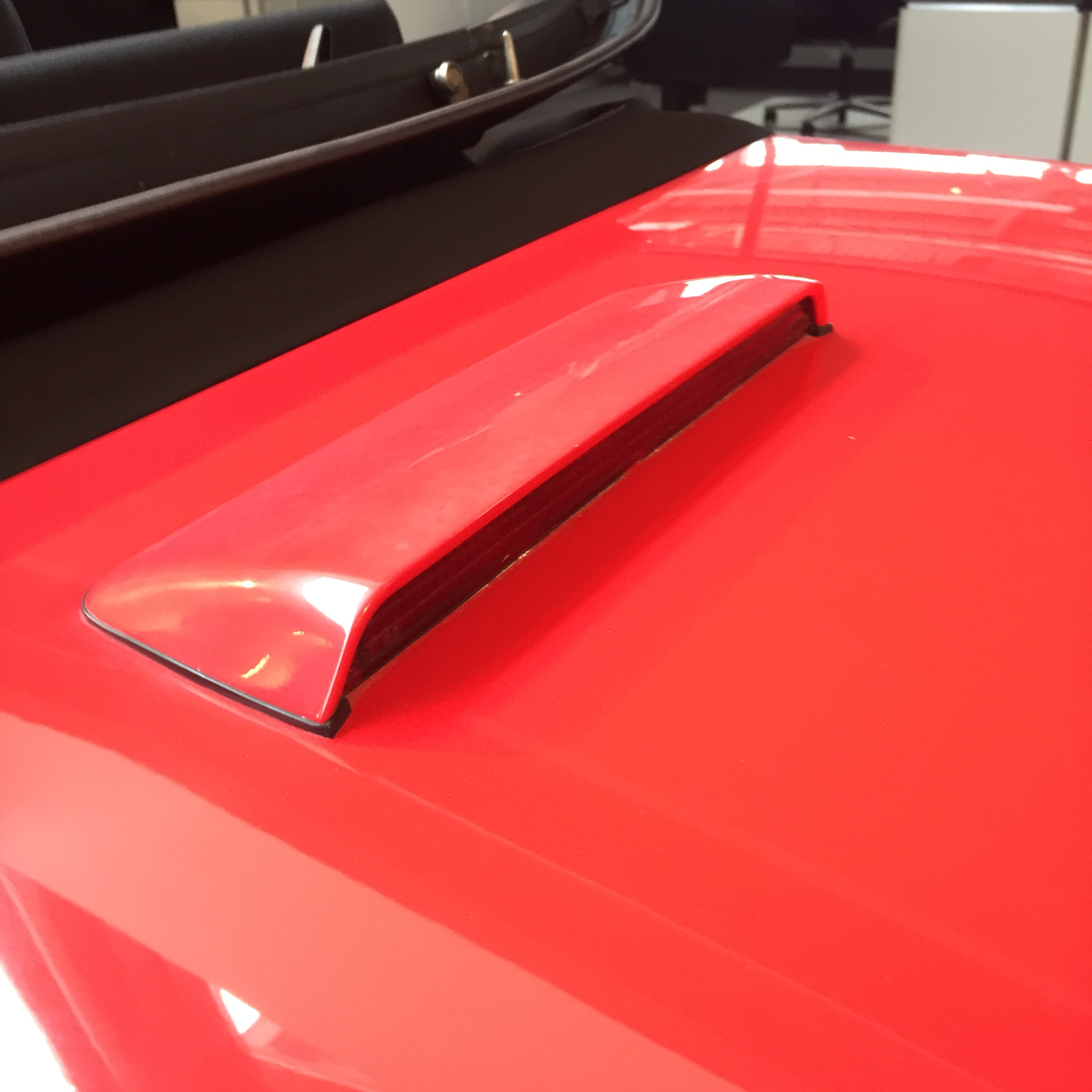 Porsche 944 Cabrio - 3. Bremsleuchte